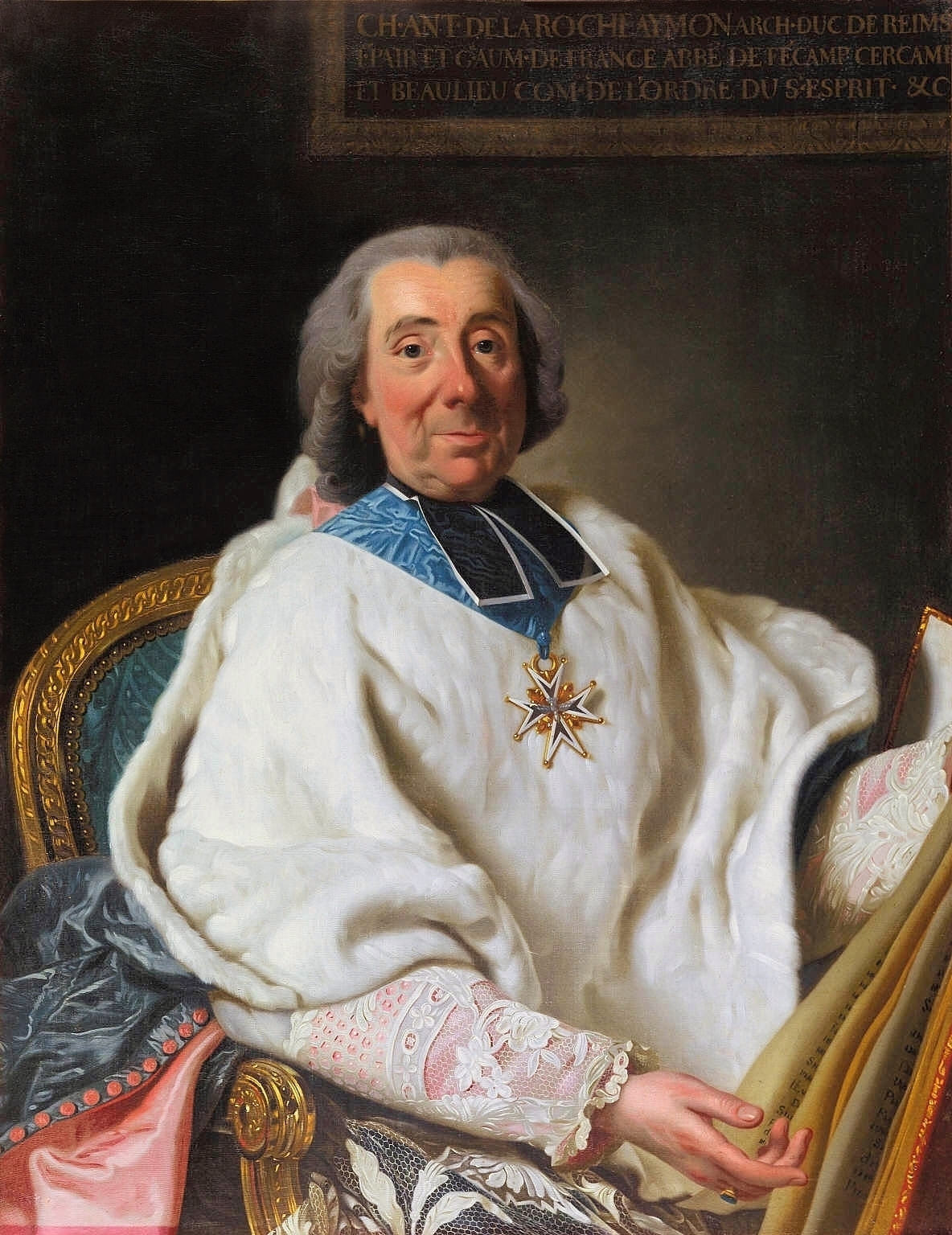 Charles-Antoine de La Roche-Aymon (1697-1771), French cardinal